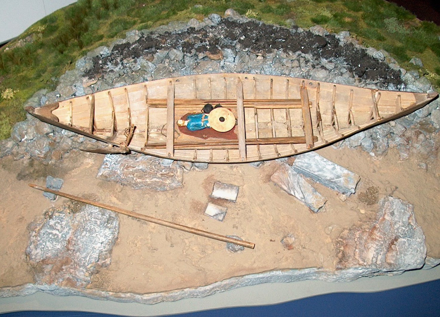 Denne modellen som er stilt ut på Manx Museum i Douglas er på mest mogleg nøyaktig vis basert på undersøkinga av skipsgrava på Chapel Hill, Balladoole.